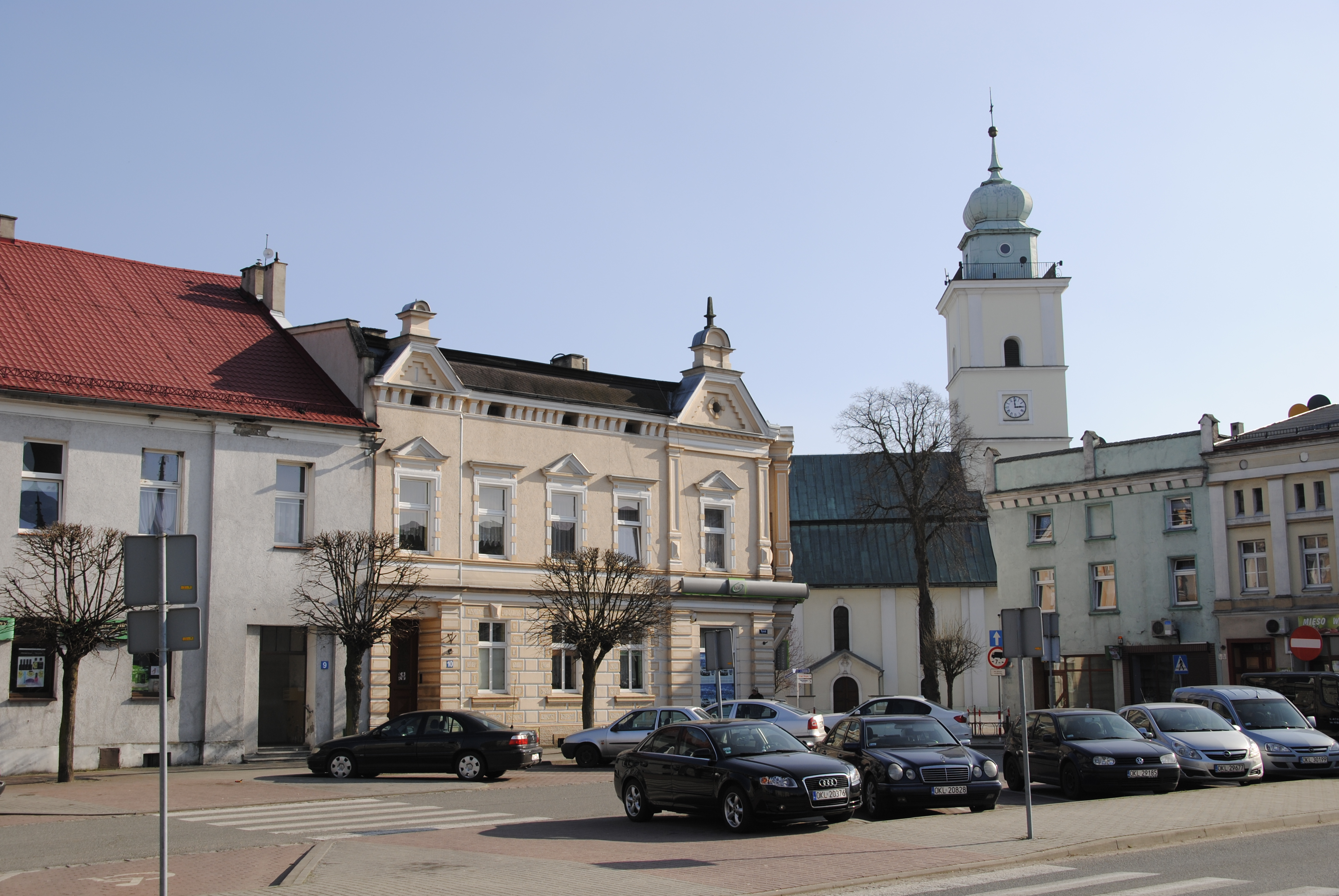 Ostzeile der Bebauung am Ring in Konstadt Oberschlesien (Wołczyn)